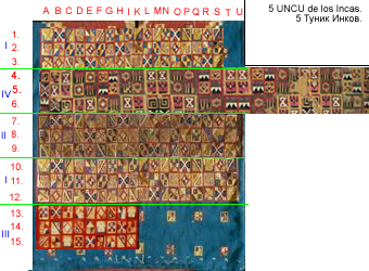 Токапу Инков. Праздничные рубахи унку правителей Инков